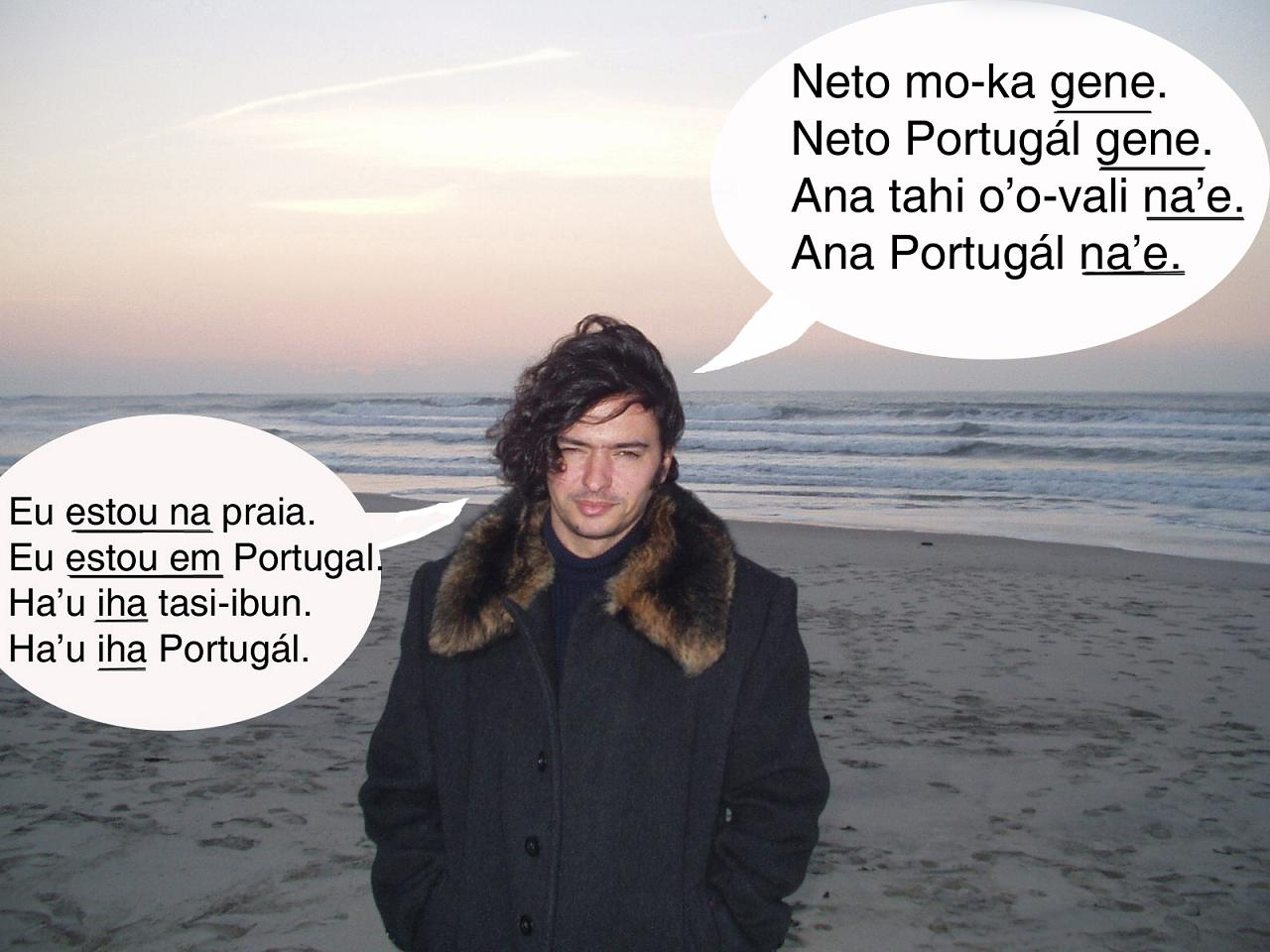 Photo by Jorge Esperança & editing by João Paulo T. Esperança. This photo was used as ilustration in a Portuguese language course in Tetum, whose lessons used to be published weekly in the East Timorese newspaper Lia Foun. Fotografia de Jorge Esperança e composição por João Paulo T. Esperança. Esta fotografia foi usada como ilustração num curso de língua portuguesa em tétum cujas lições eram publicadas no jornal timorense Lia Foun. Person portraited / Pessoa retratada: João Paulo T. Esperança, in Ílhavo (Portugal)